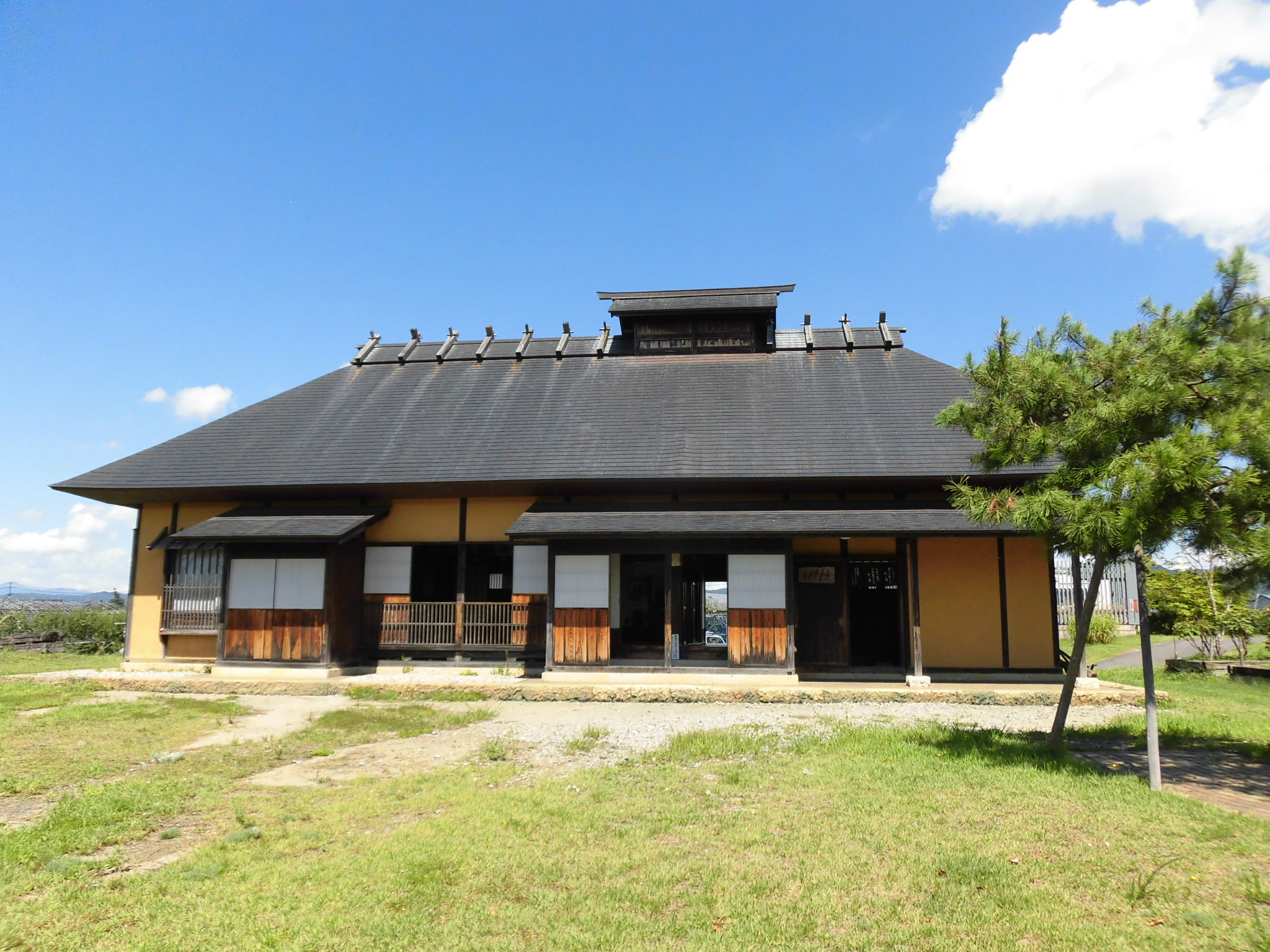 浜田広介の生家（移築復元）。まほろば・童話の里 浜田広介記念館内に所在。（山形県東置賜郡高畠町）